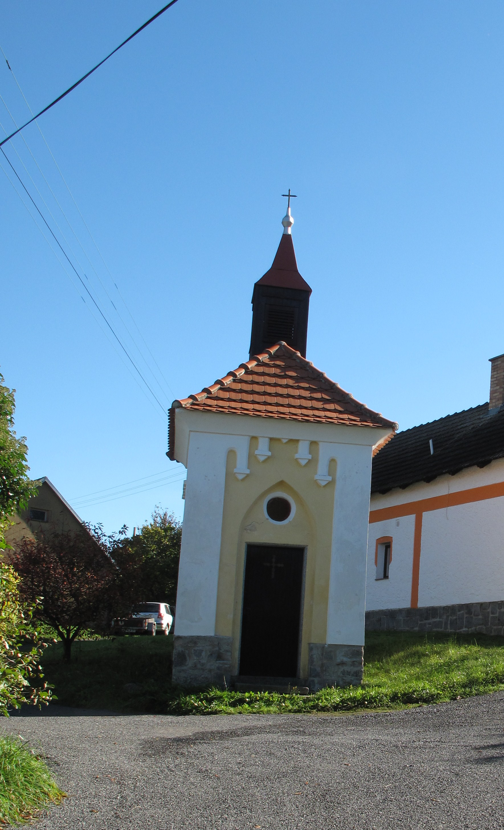 Kaplička ve Skruhrově. Okres Příbram, Česká republika.